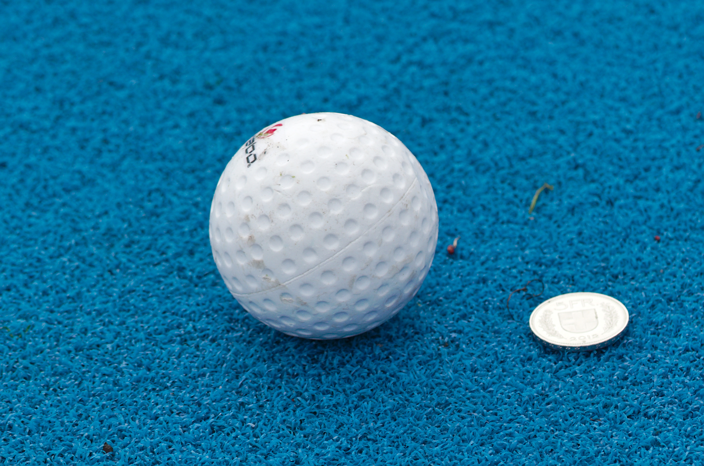 Balle de hockey sur gazon avec pièce de 5 francs